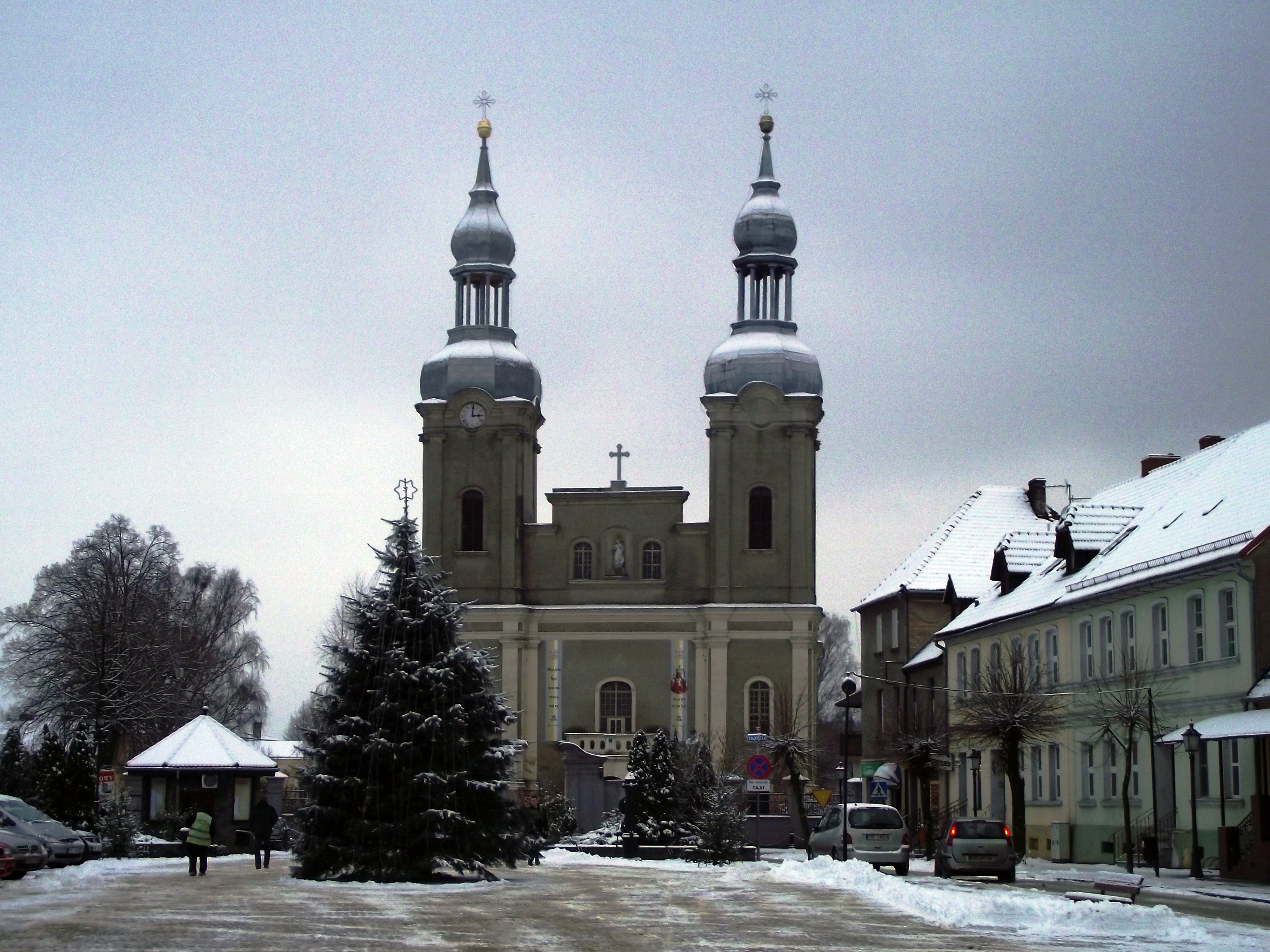 Zbąszyń, kościół par. p.w. Wniebowzięcia NMP, XVIII